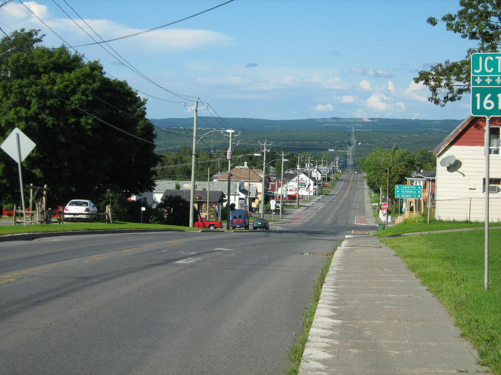 Le village de Stornoway en août 2008